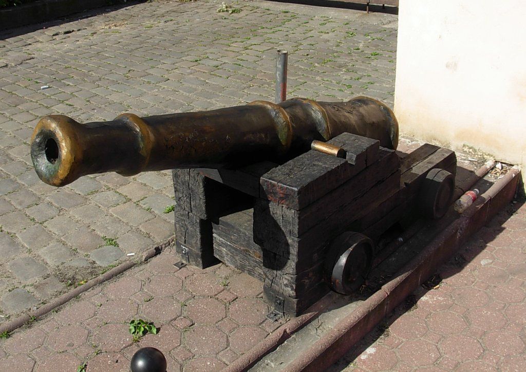 Armata przy ul. Podwale w Bydgoszczy